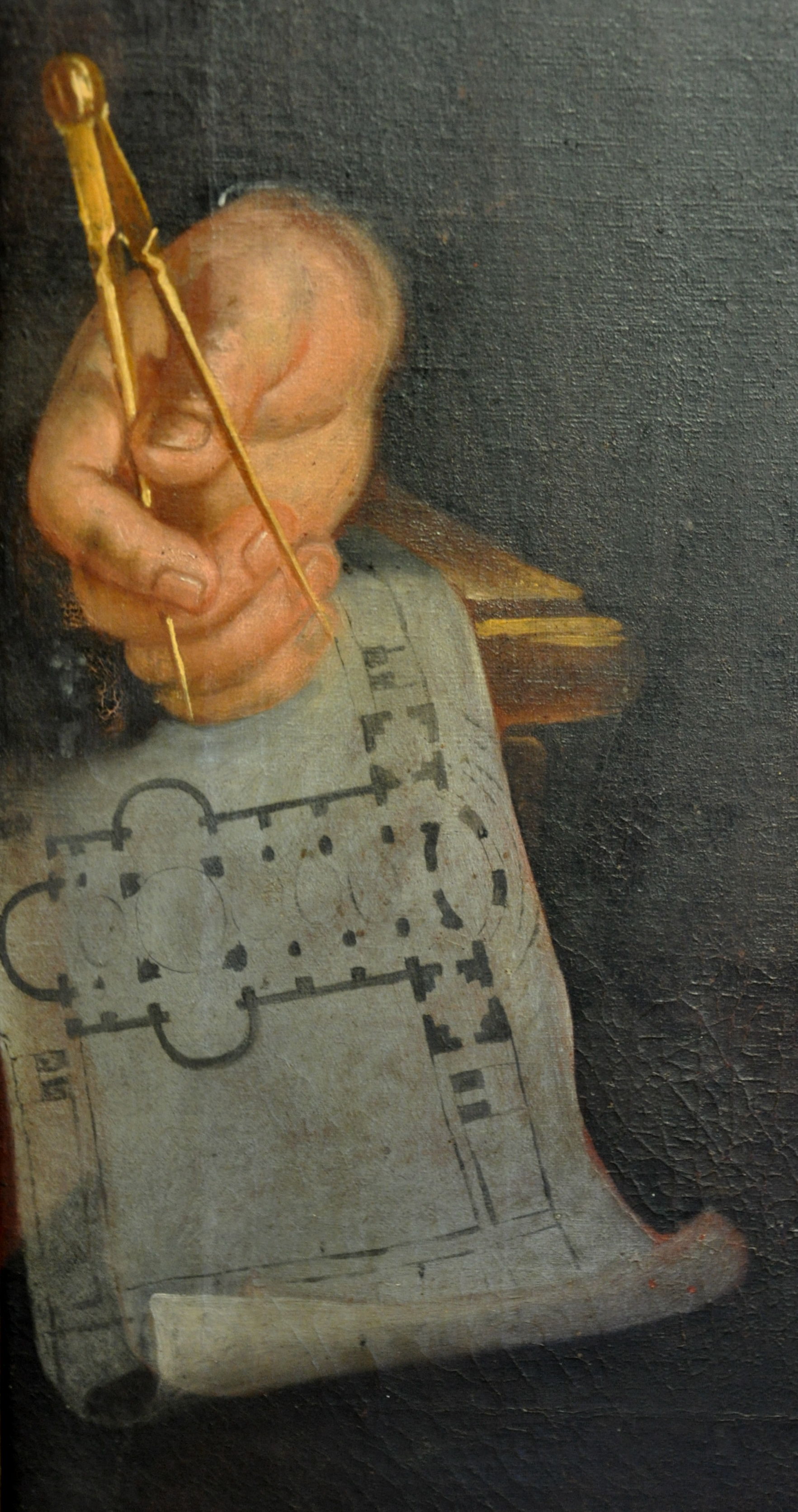 Sebastian Hyller, Abt der Reichsabtei Weingarten, Detail: Bauplan der Barockbasilika Stadtmuseum Weingarten; Leihgabe der Staatlichen Schlösser und Gärten Baden-Württemberg/Benediktinerabtei Weingarten (Maler und Jahr nach Spahr 1974, im Museum nur als „Ölgemälde, 18. Jh.“ bezeichnet)